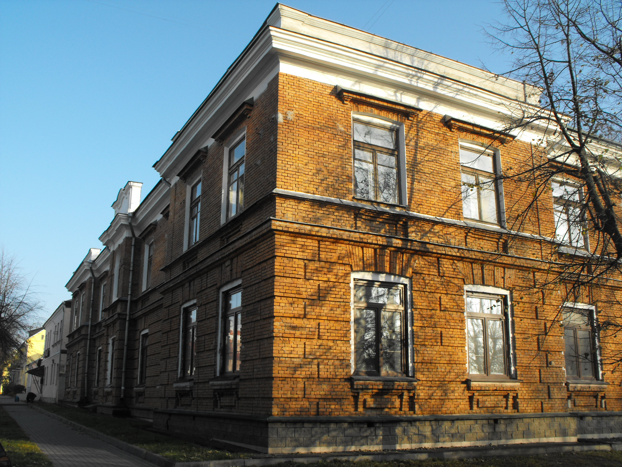 Здание бывшей еврейской больницы. «Кирпичный» стиль. 1914 год, достройка 1919-1921. Автор неизвестен. Реставрация конца 1990-х. Сегодня: учреждение здравоохранения. Брест, ул. Советских пограничников, 54